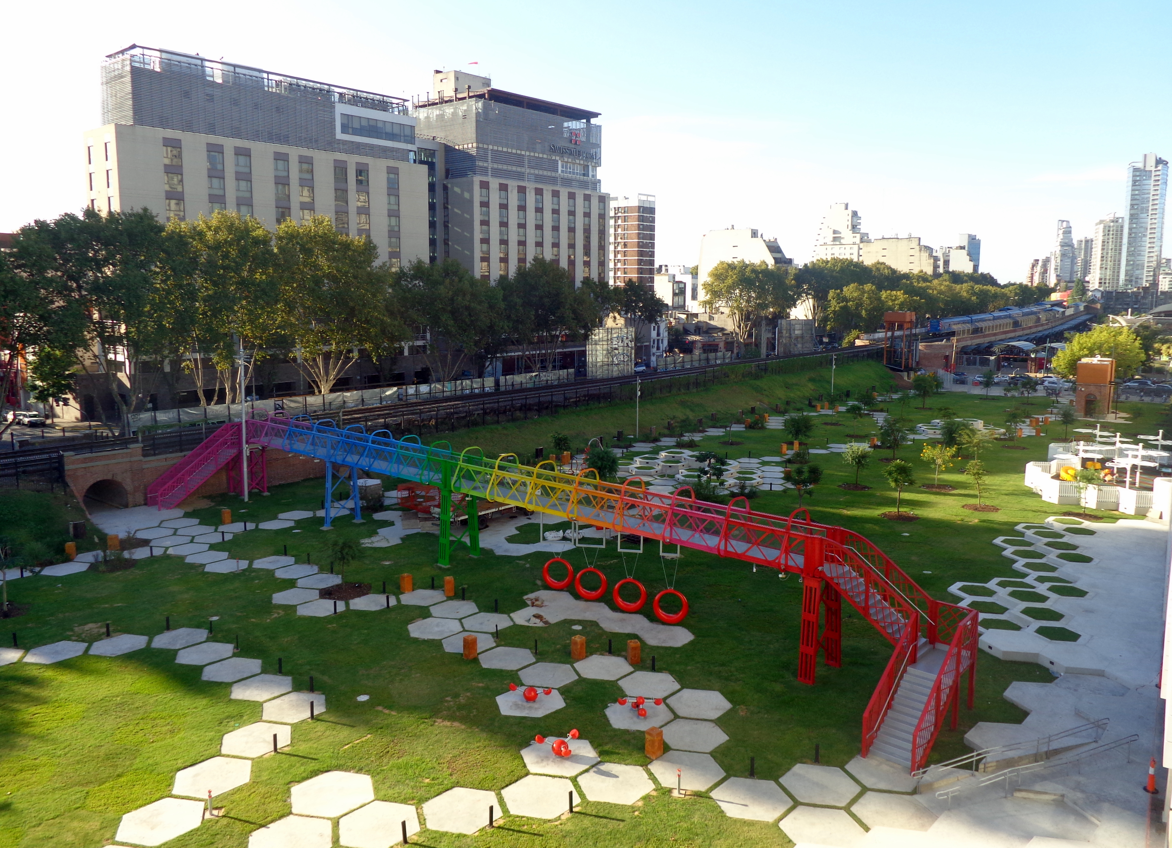 Parque de las Ciencias, en barrio de Palermo, Buenos Aires, Argentina